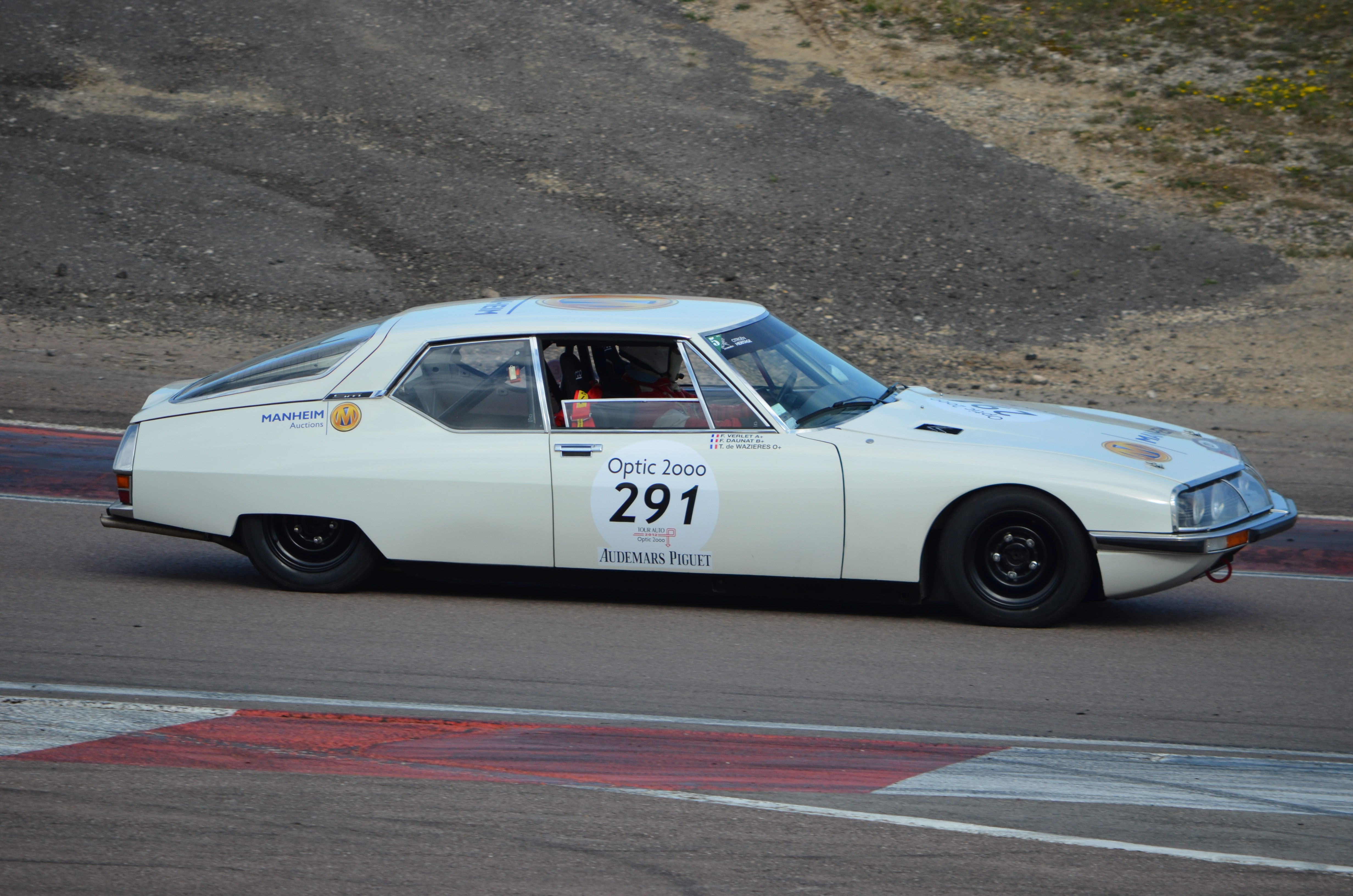 Citroën SM, numéro 291, Tour Auto 2012, étape sur le Circuit de Prenois.